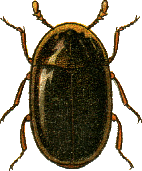 This file has been extracted from another file: Jacobs17.jpg